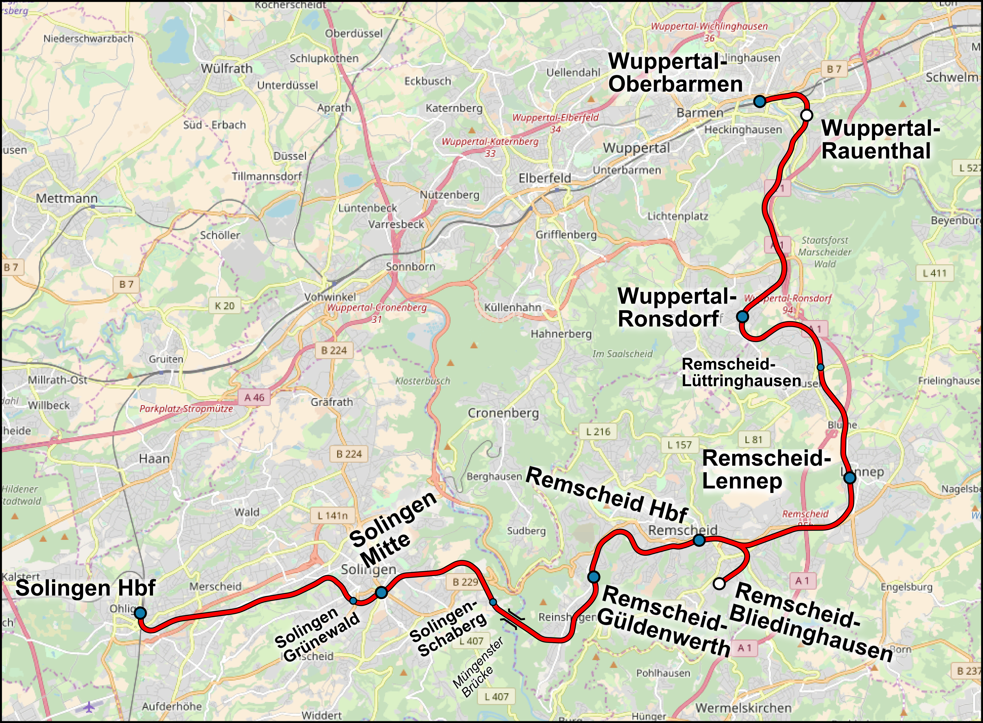 Karte der Bahnstrecke Solingen–Wuppertal